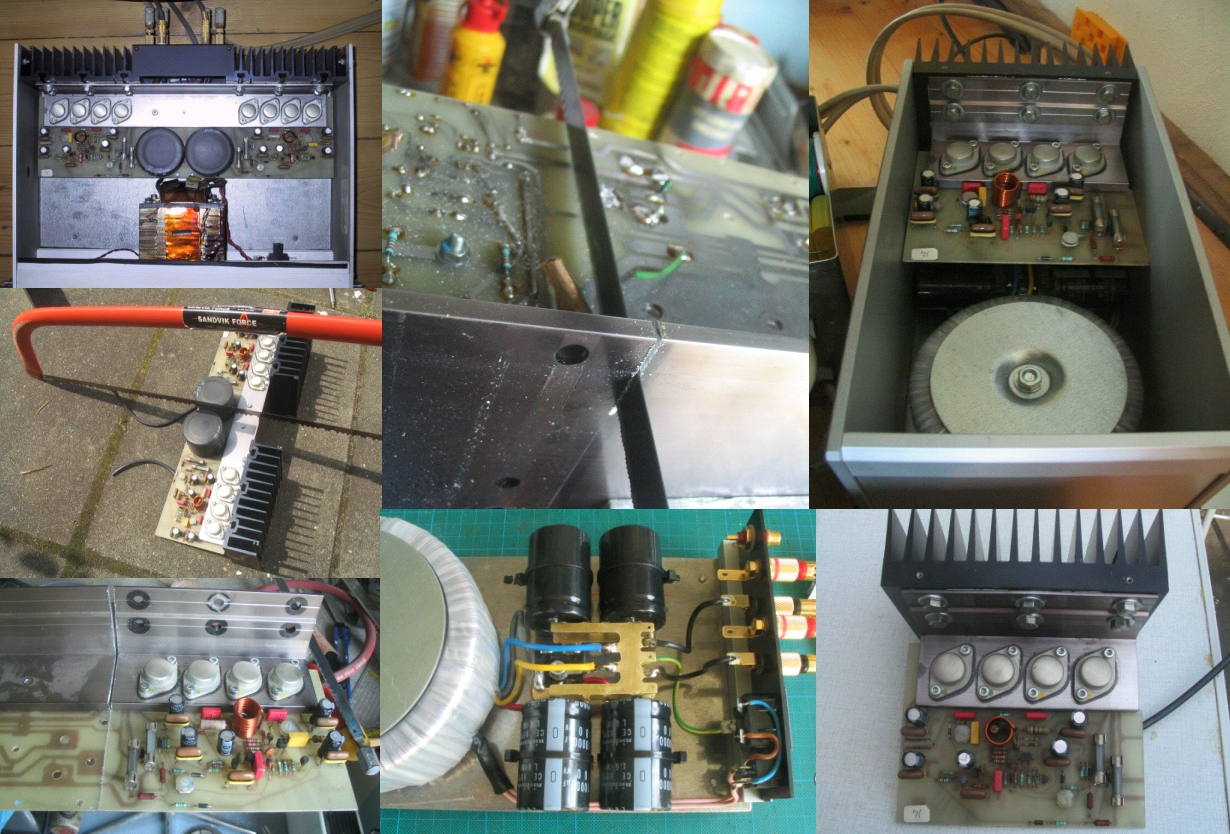 Door de auteur zelf gemaakte kollage van zelfgemaakte foto's.